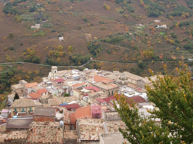 Panorama Ucria